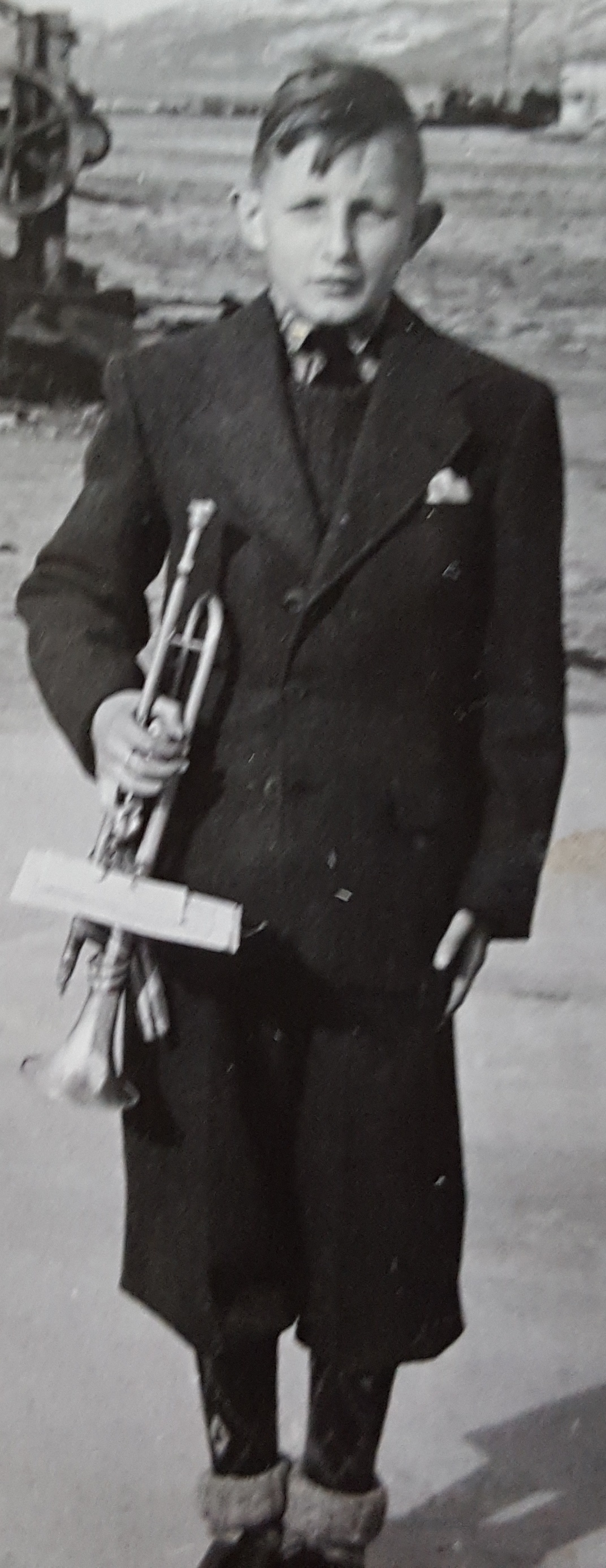 Svein Hauan, ung musikant i 1945